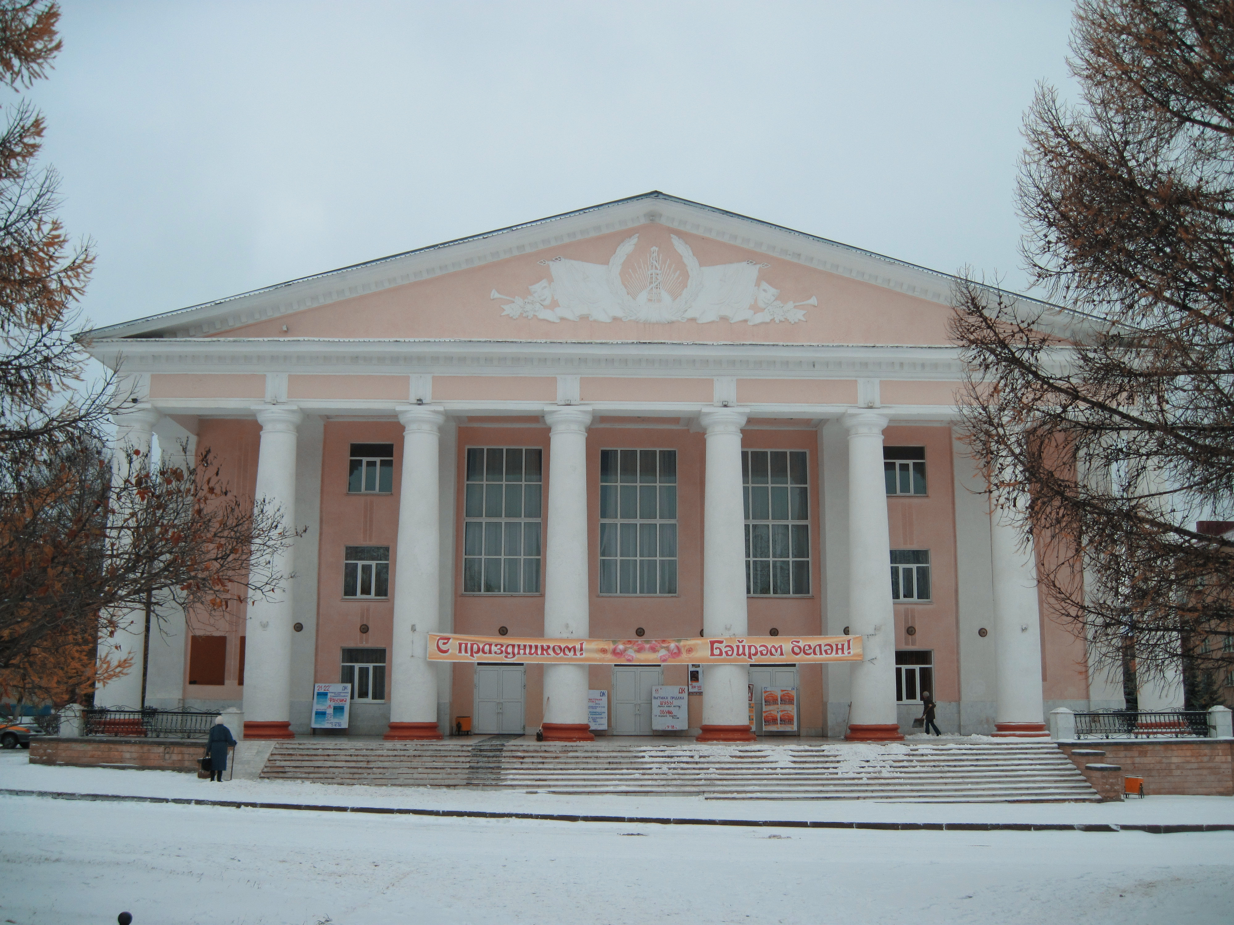 Дворец Культуры города Лениногорск